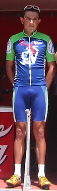 Comunidad Valenciana, Euskal Bizikleta 2005 José Adrián Bonilla